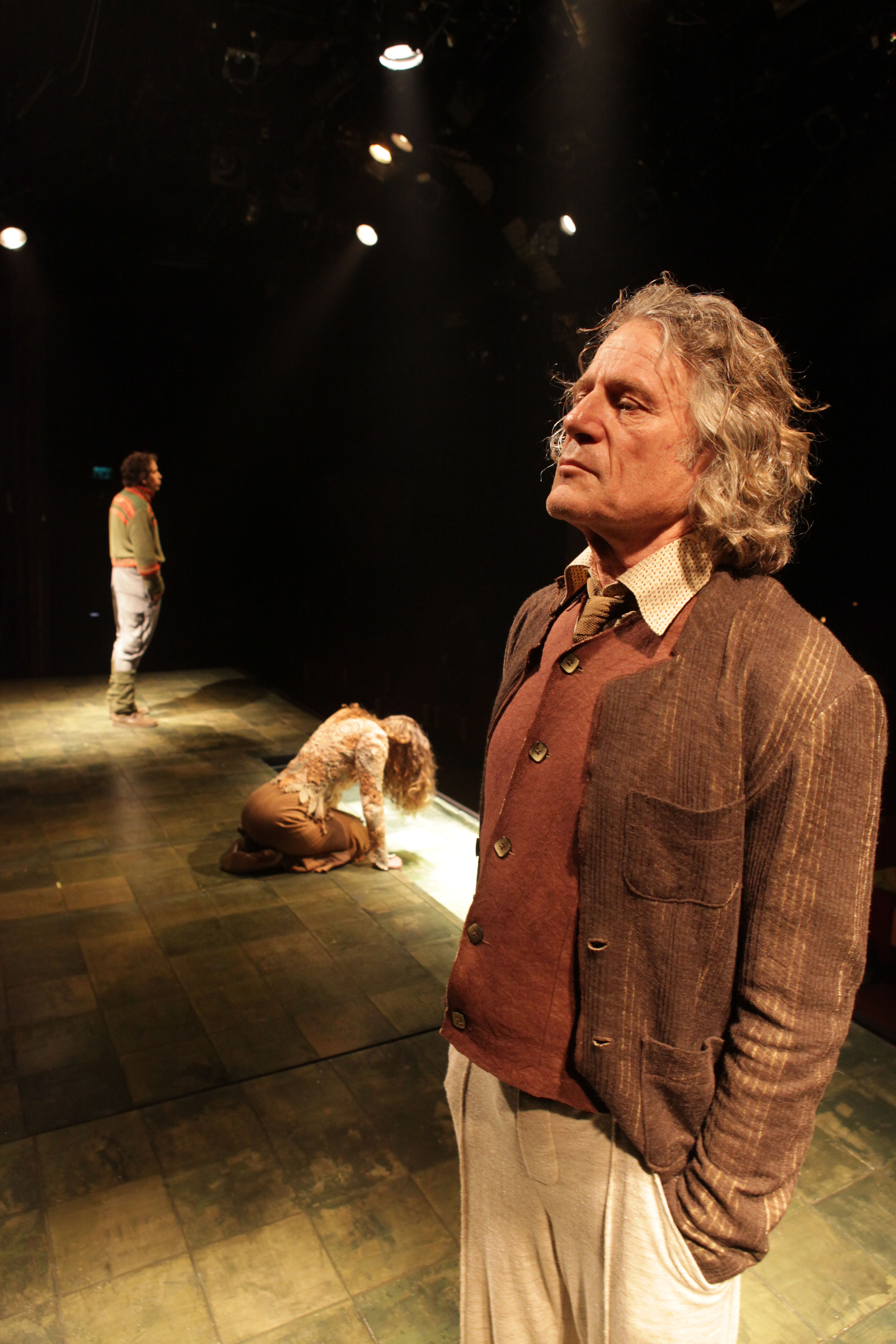 אבי פניני, אורית גל ויואב היימן ב"מולי סוויני", תיאטרון החאן, 2011